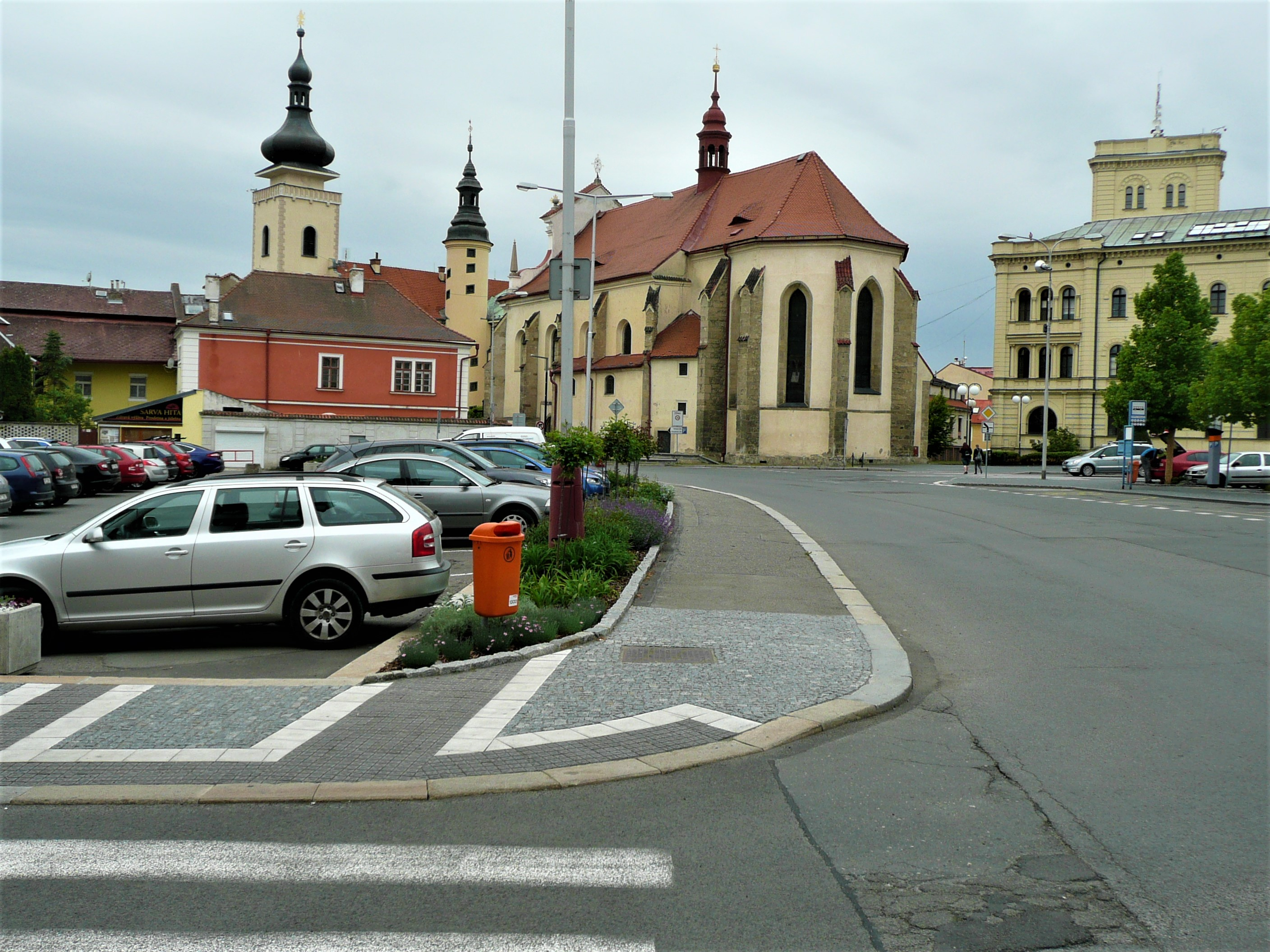 Kirche Maria Himmelfahrt in Mlada Boleslav